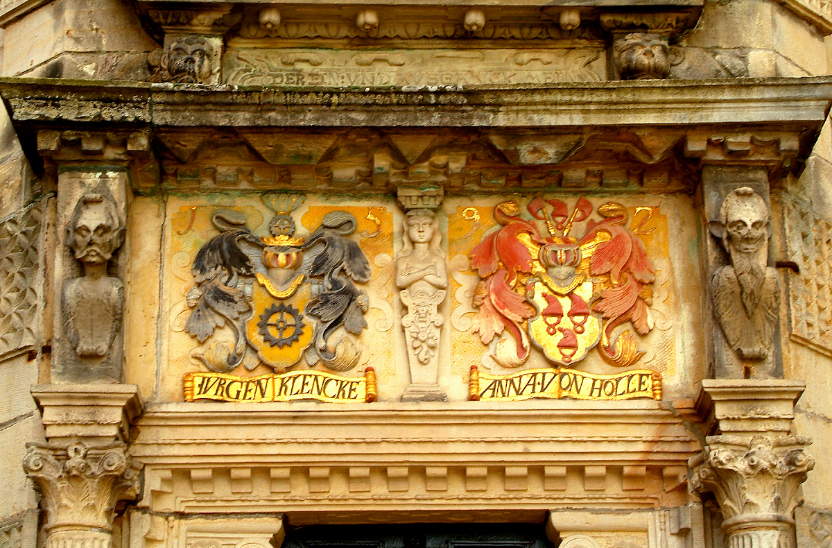 Auswahl von Ansichten aus Emmerthal-Hämelschenburg, die Ortschaft rund um Schloss Hämelschenburg mit ihren jahrhundertealten Geschichten bis in die Gegenwart.